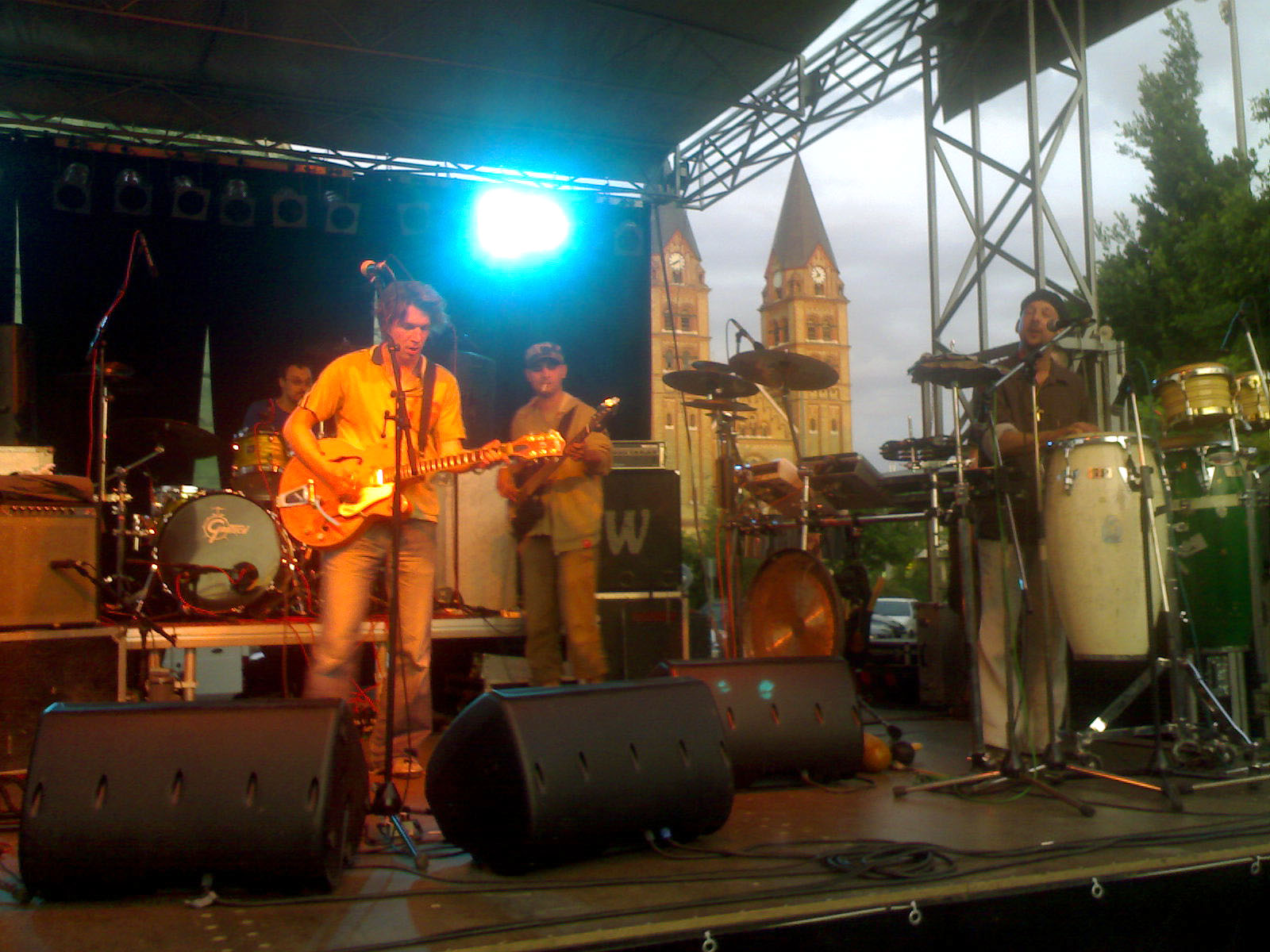 A Quimby együttes 2007. 05. 17-i koncertje Nyíregyházán. Készítette: Kiss Bence (Iecs)